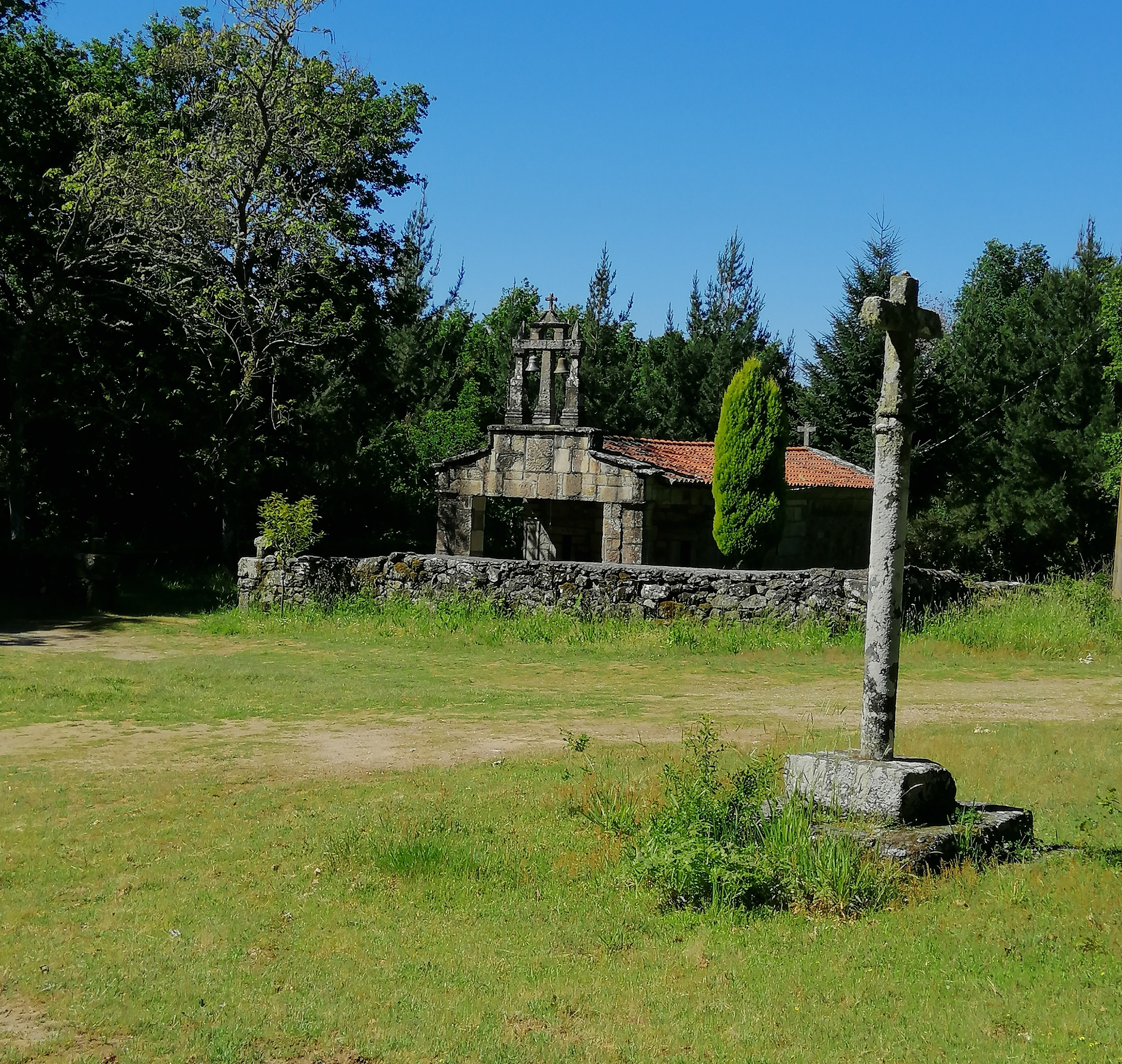 Estos son os arredores da capela de Santo Antonio, situada na aldea da Casanova.